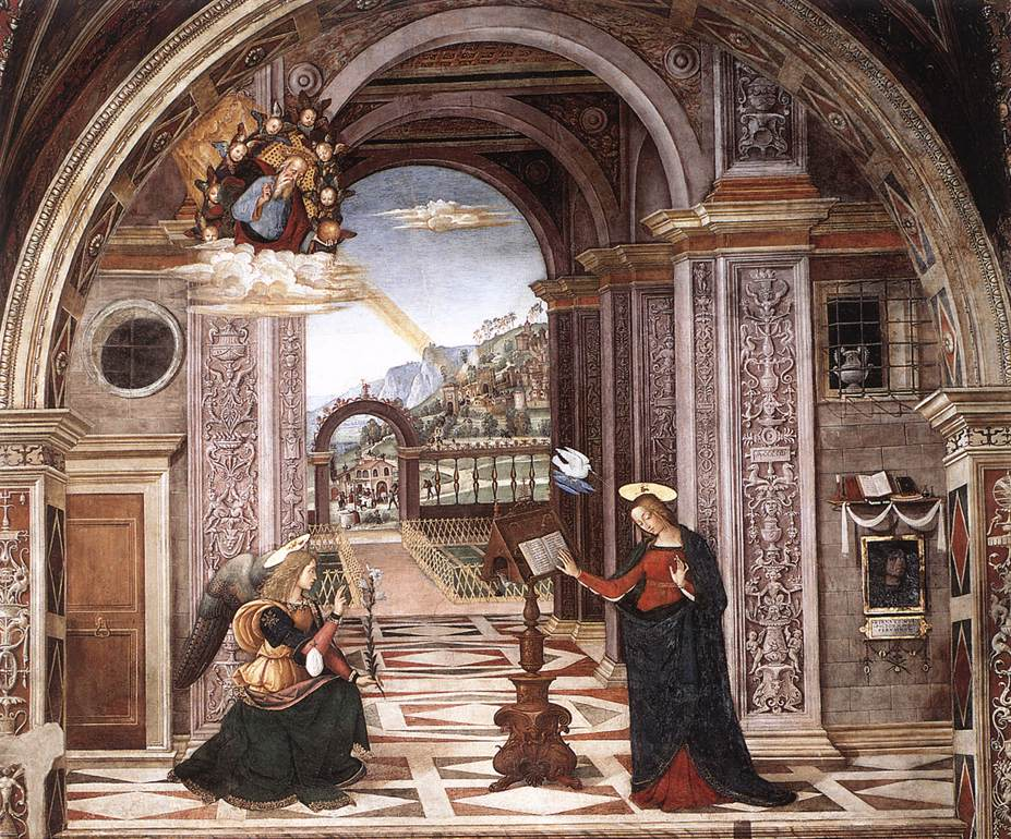 PINTURICCHIO Annunciation Fresco Cappella Baglioni, Collegiata di Santa Maria Maggiore, Spello